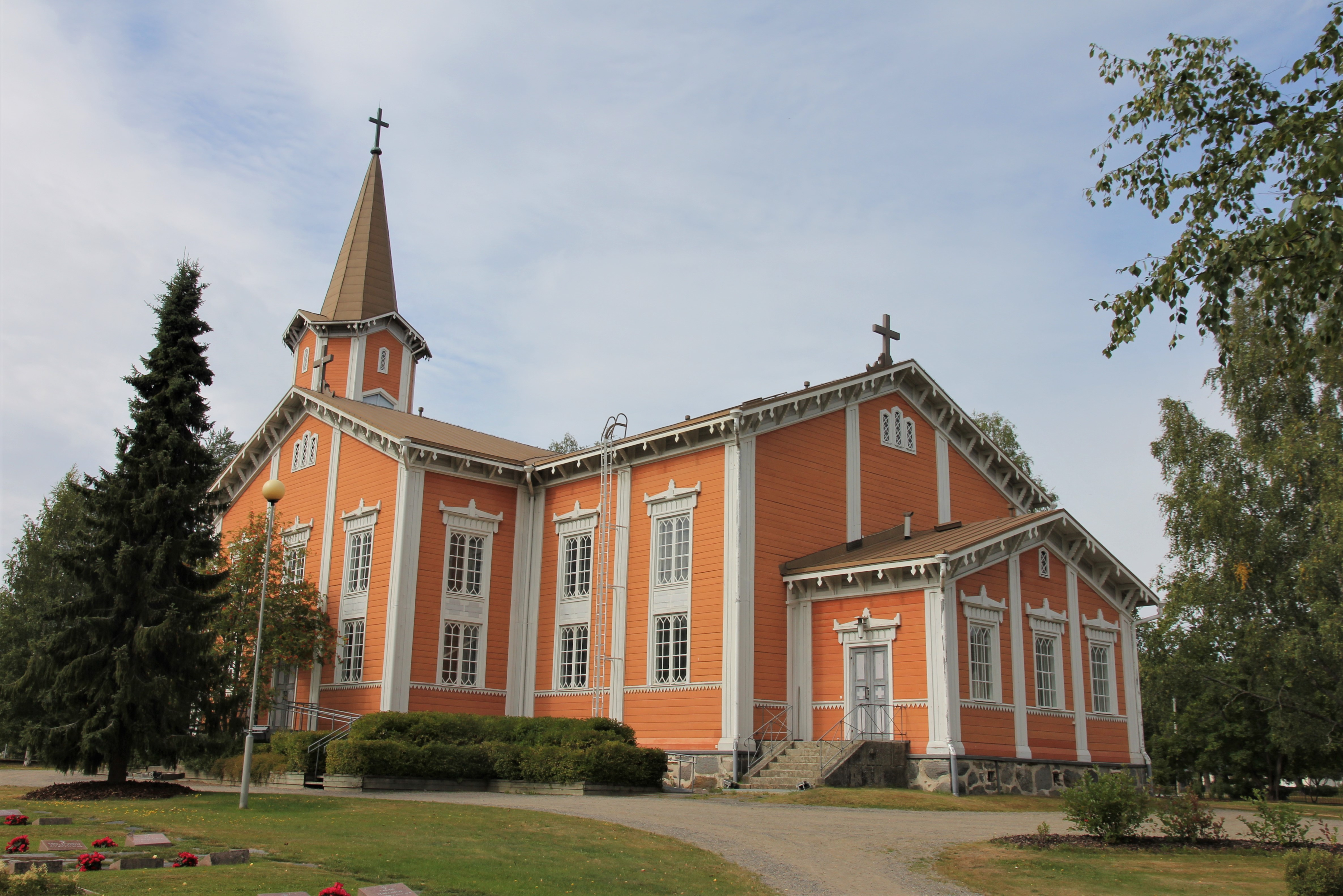 Suonenjoen kirkko on vuosina 1863-1865 rakennettu, lääninarkkitehti Ferdinand Öhmanin suunnittelema päätytornillinen, uusgoottilainen puukirkko. Kirkon punaokran sävyinen ulkomaalaus jäljittelee puhtaaksimuuratun tiiliseinän sävyä. Kirkon osoite on Asemakatu 13, Suonenjoki. Kuva elokuulta 2019.